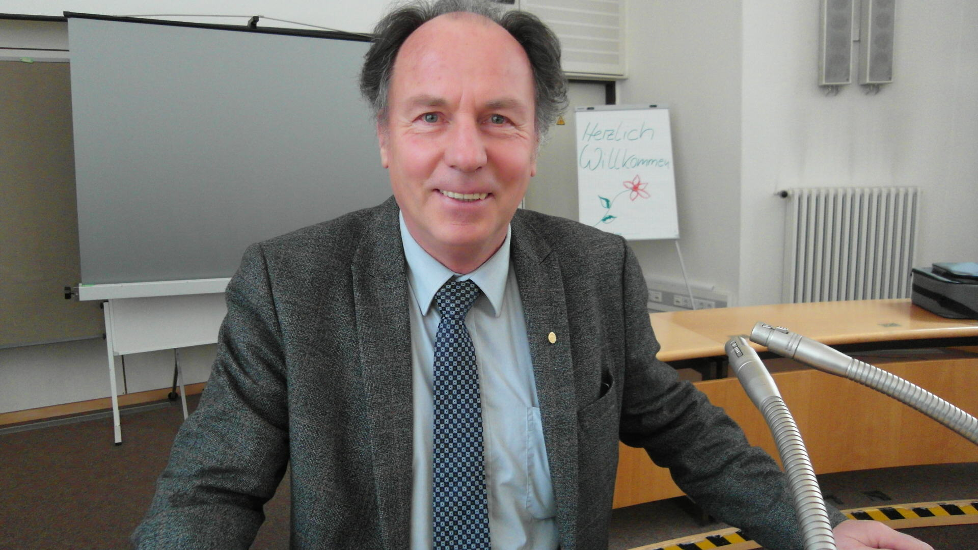 Gerhard Banse (01.2014)